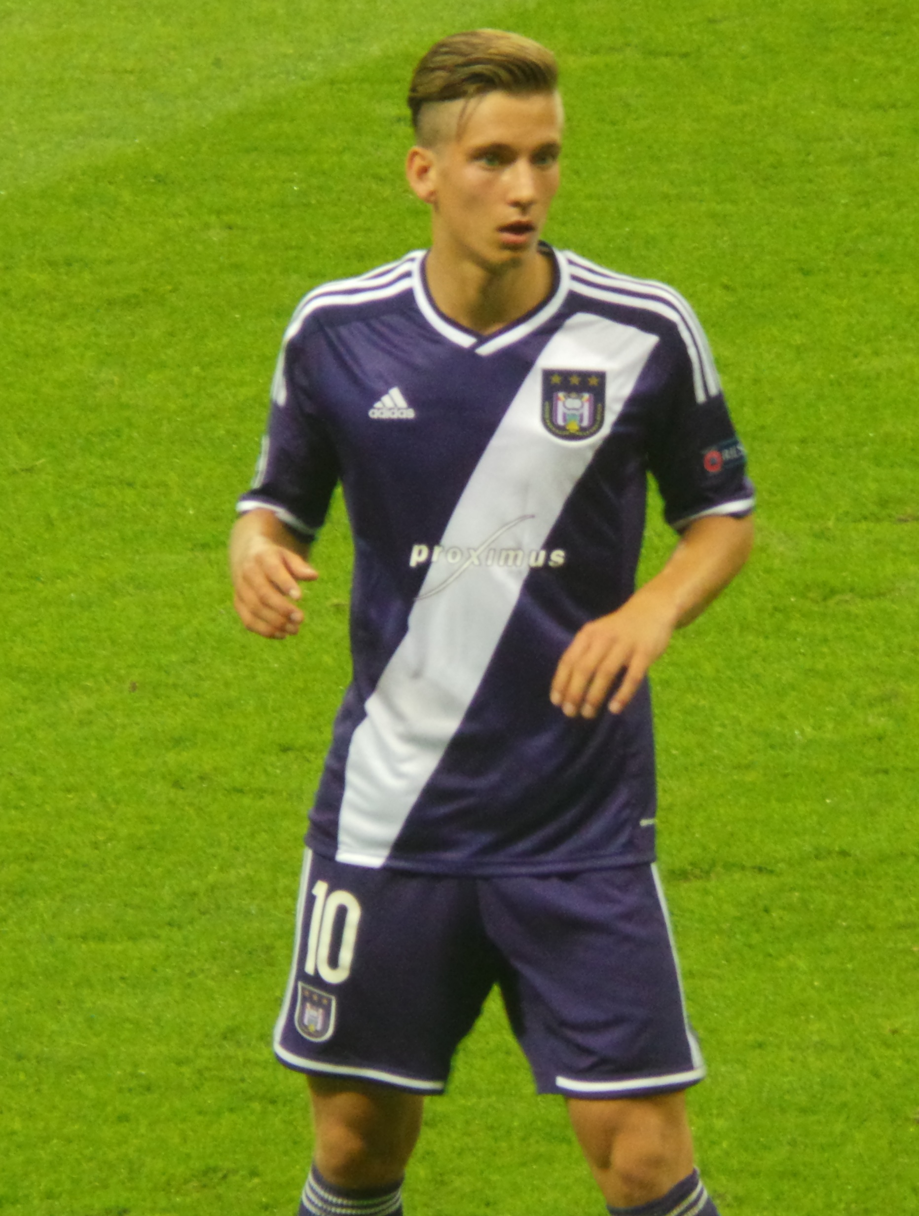 Dennis Praet vs Galatasaray